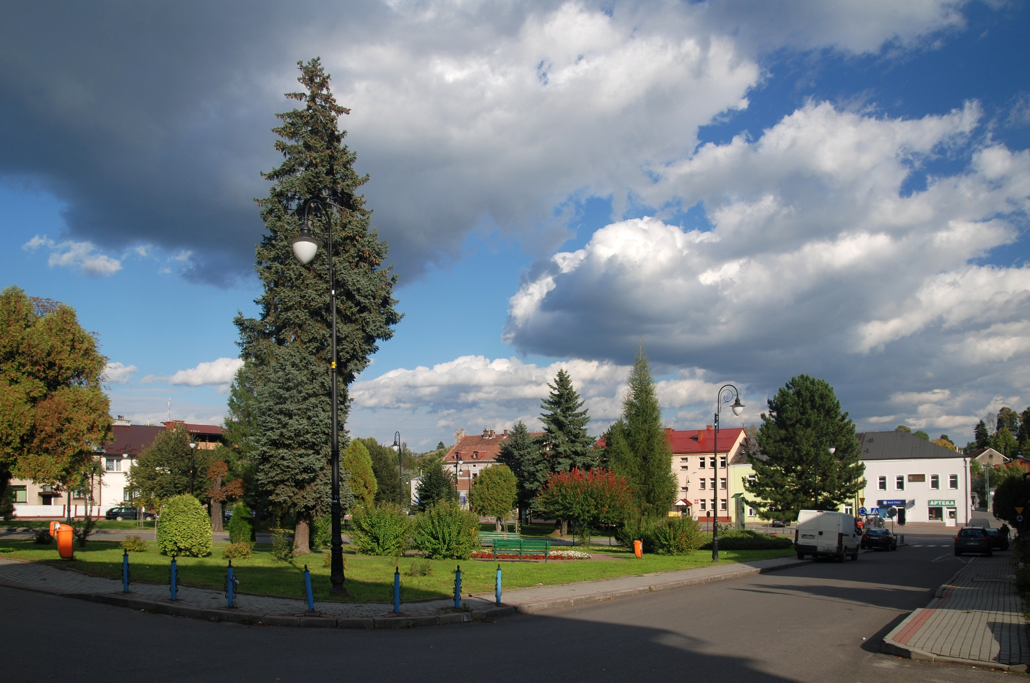 wieś Korczyna (województwo podkarpackie)